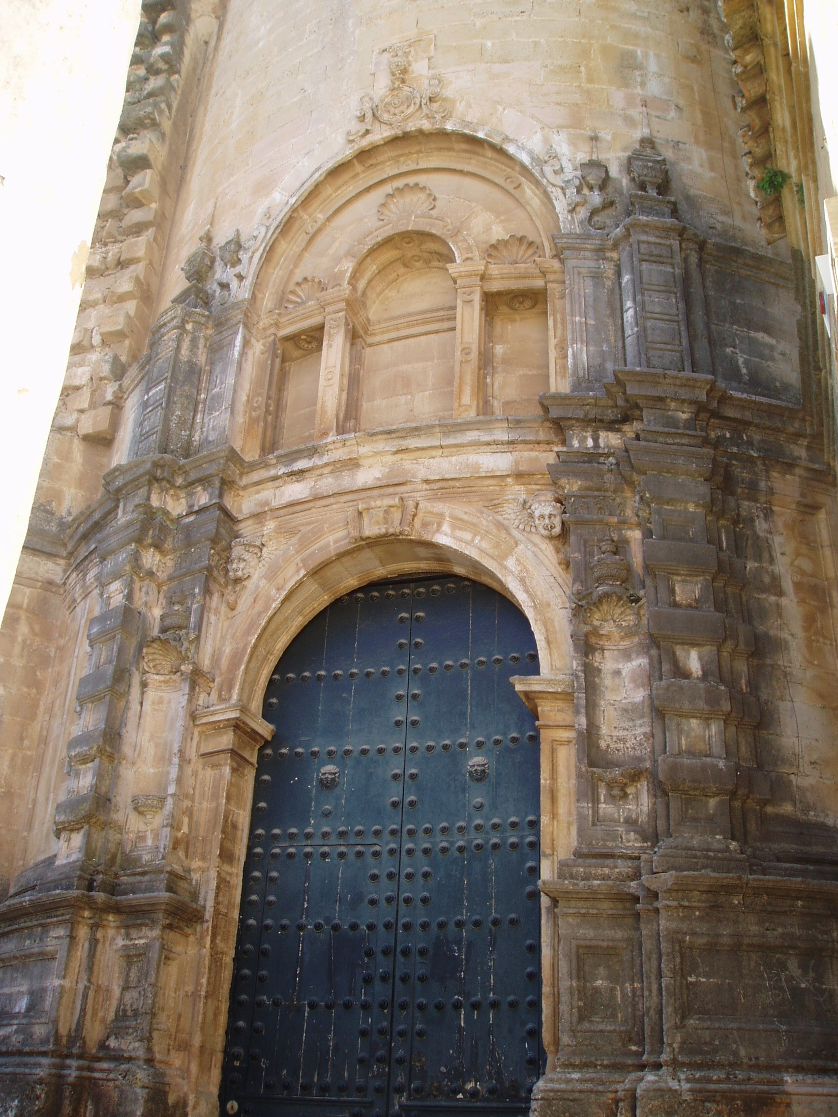 Iglesia de Santa María la Mayor de Ronda, España.